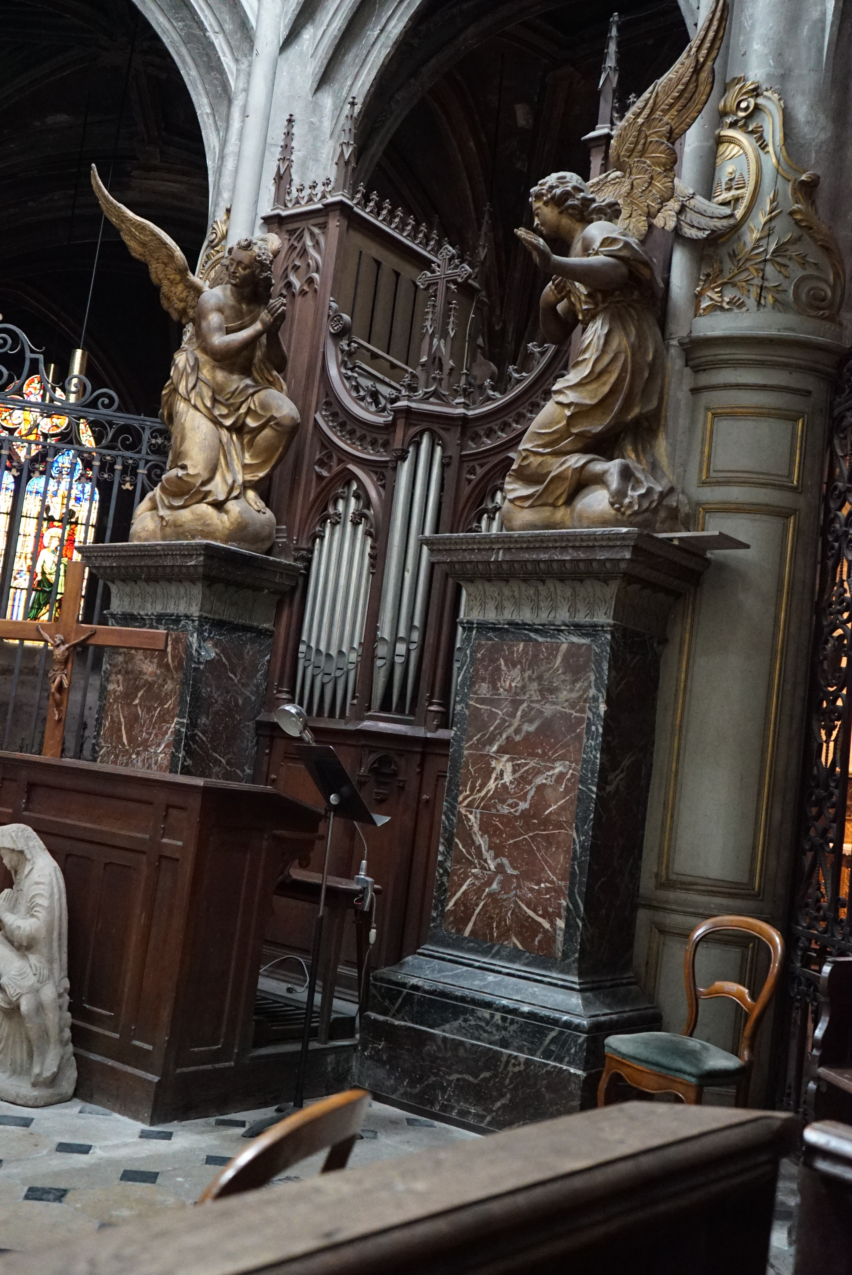 de la basilique de Chaumont.